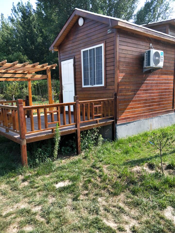 银山镇田园风光